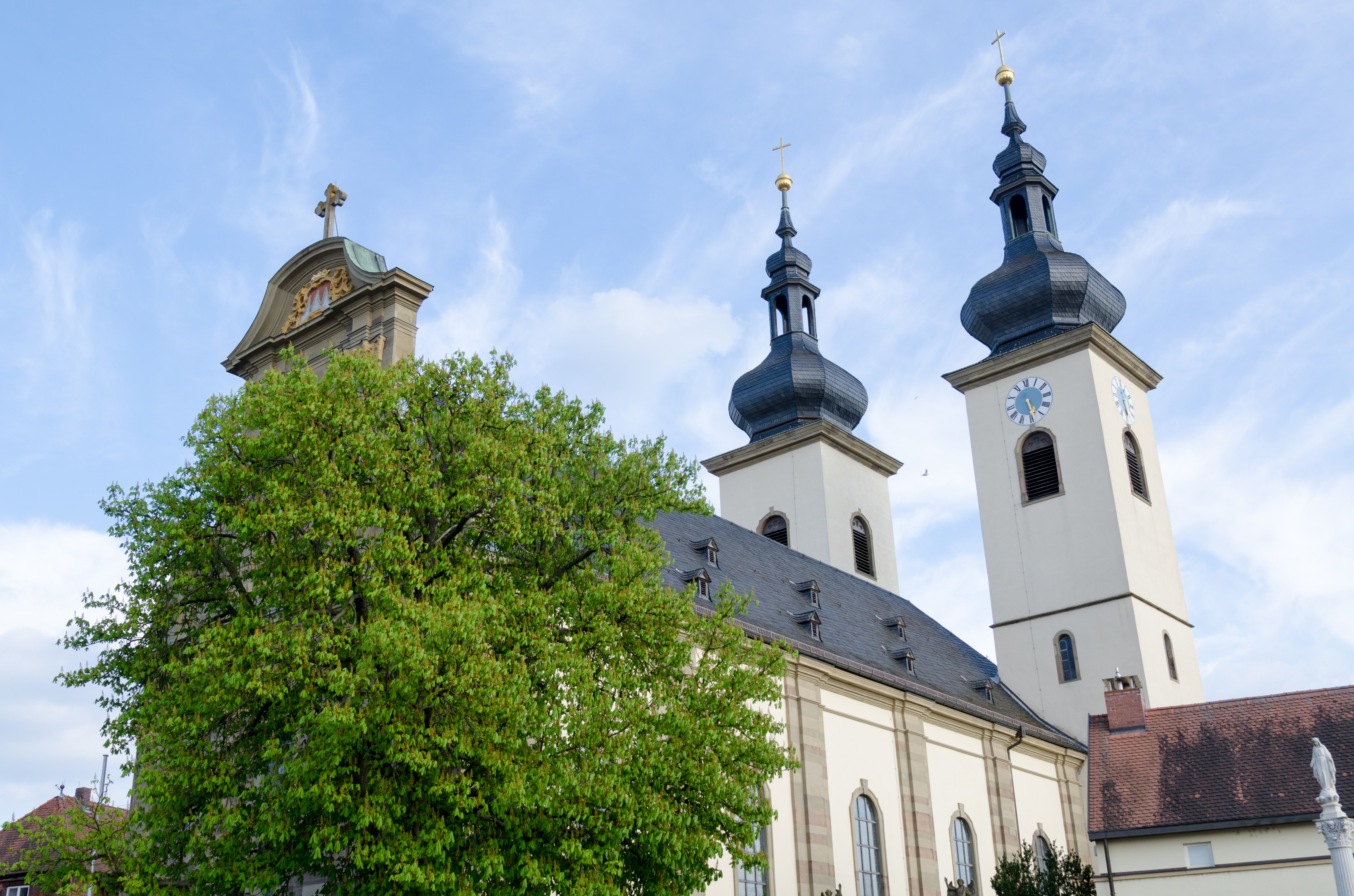 Grafenrheinfeld, Pfarrkirche Kreuzauffindung